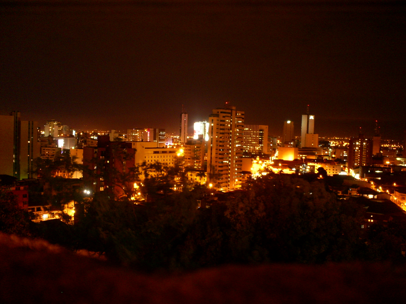 Panorámica nocturna de Cali